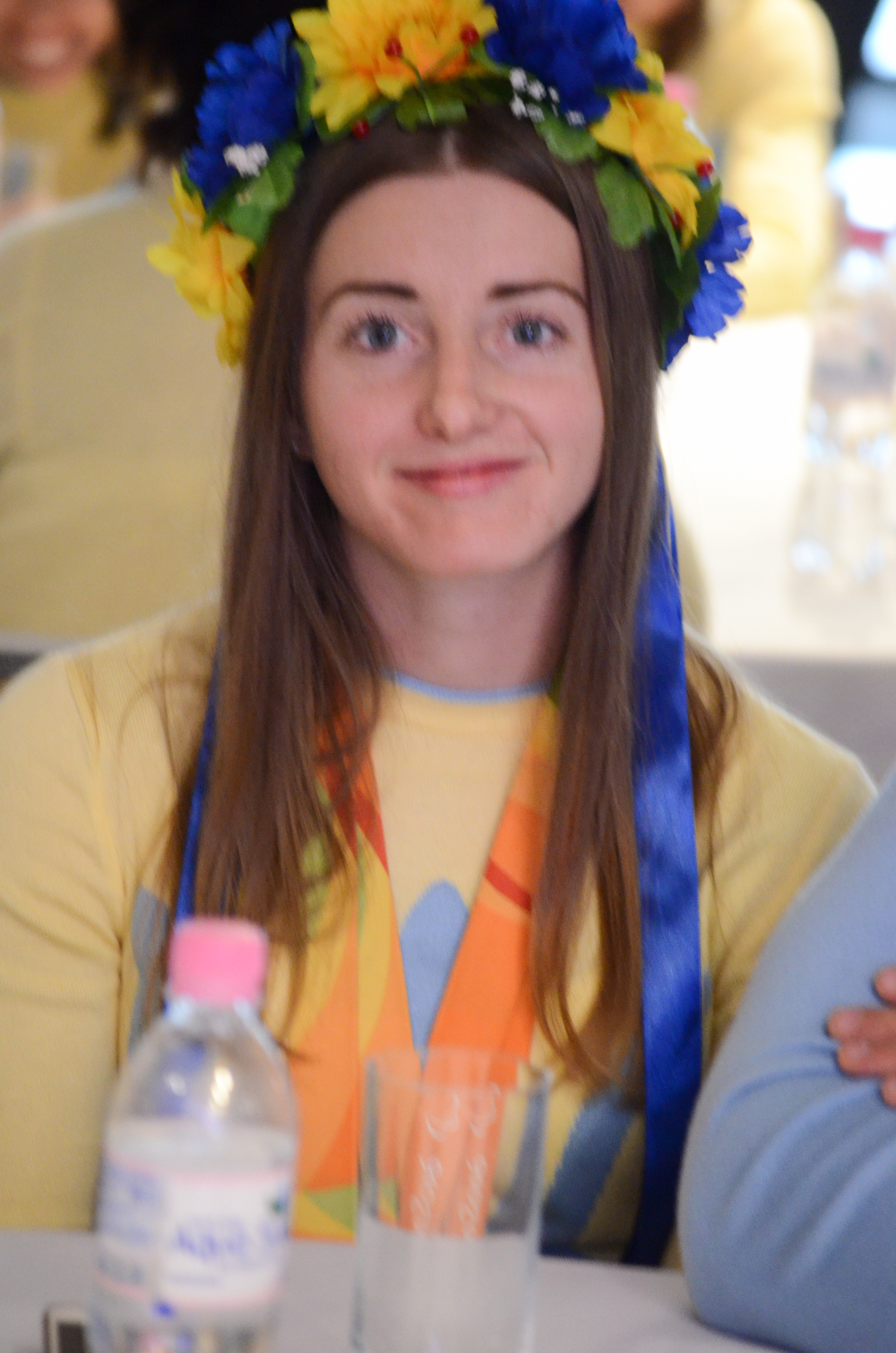 Зустріч Президента України з олімпійцями та паралімпійцями — учасниками Ріо-2016.